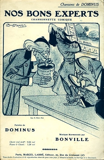 Description complète